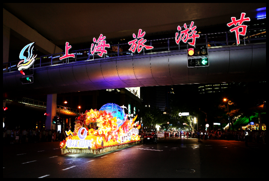 2014年上海旅游节花车巡游将于9月14日-10月6日在上海举办。